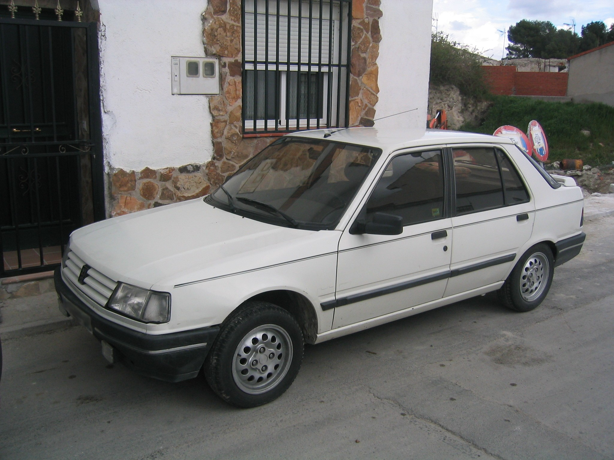 Peugeot 309 1.7 diesel.